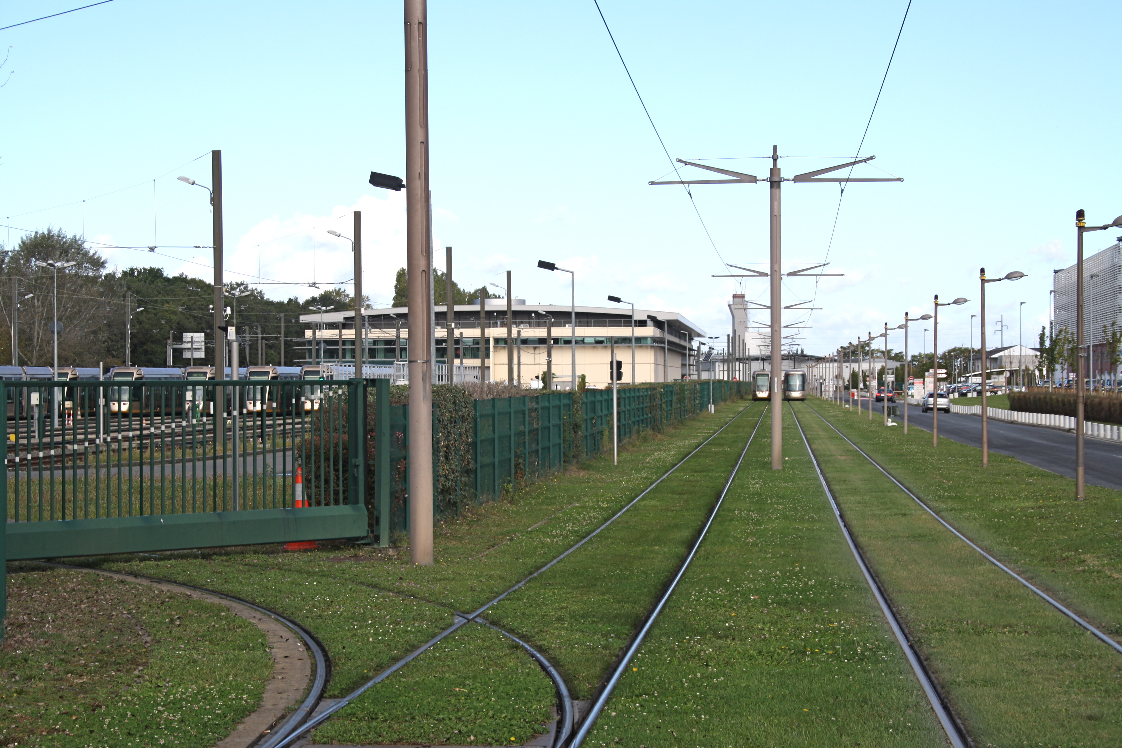 Betriebshof nahe der Endhaltestelle Hôpital de La Source